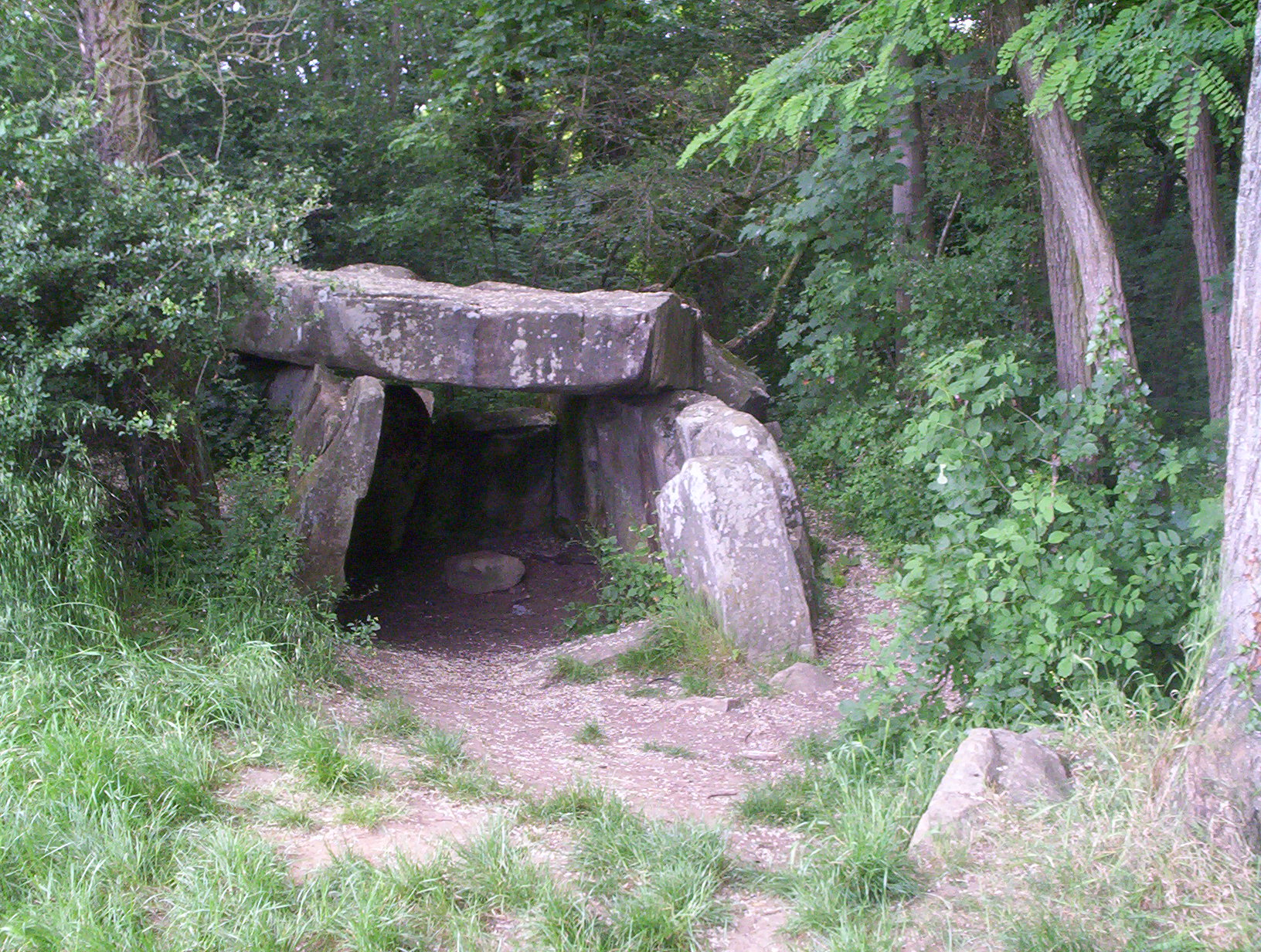 Dolmen dit de la Pierre-Levée, commune de Janville-sur-Juine. (département de l'Essonne, région Île-de-France).